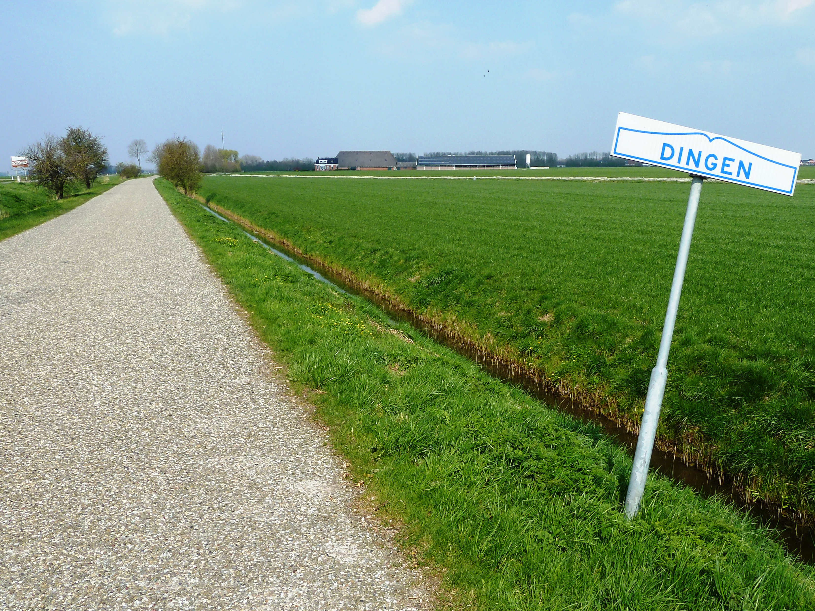 Naambordje van het gehucht Dingen of De Dingen ten zuiden van Baflo (Groningen, Nederland).